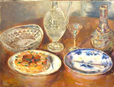 Nature-morte au Singapour